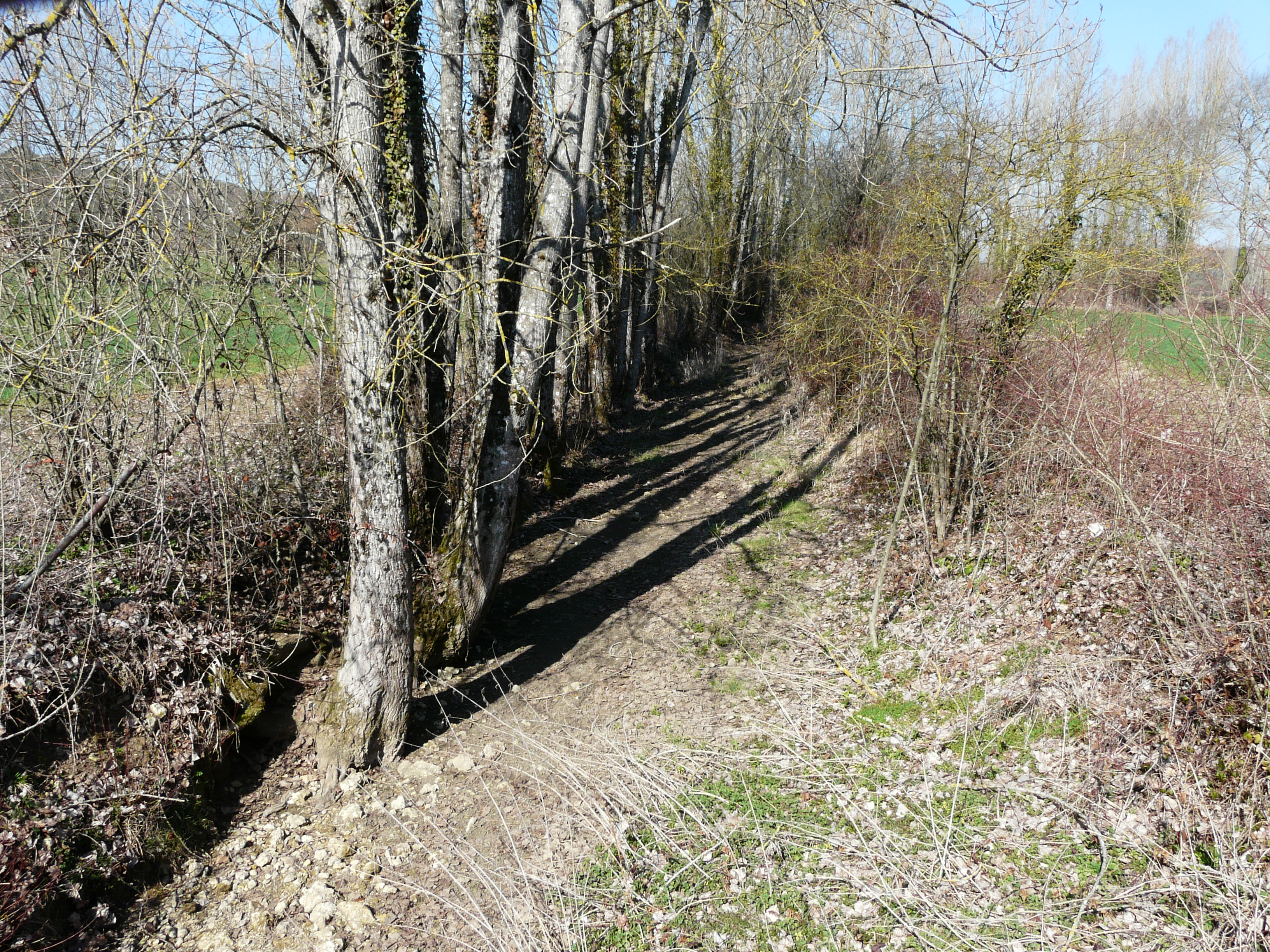 Le lit à sec du Vern au sud de la Combe, Saint-Maime-de-Péreyrol, Dordogne, France. Vue prise en direction de l'aval.